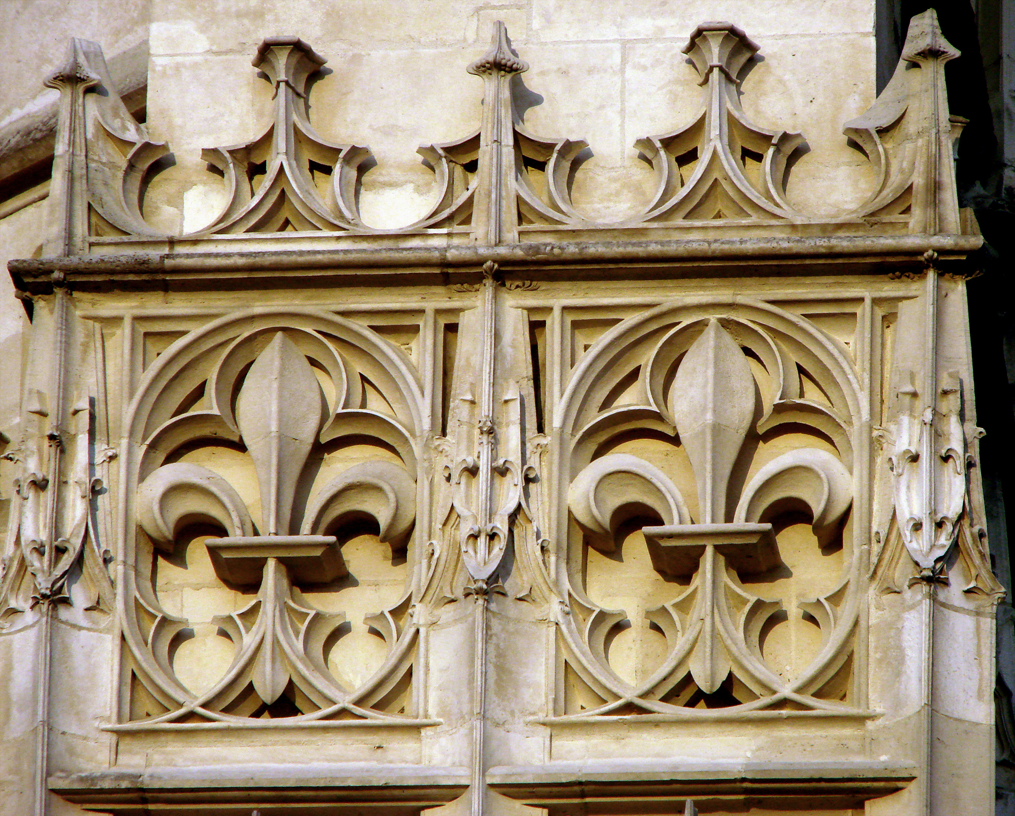 Détail de la frise de fleurs de lys sur la façade de la cathédrale Saint-Pierre-et-Saint-Paul de Troyes, 13ème siècle.